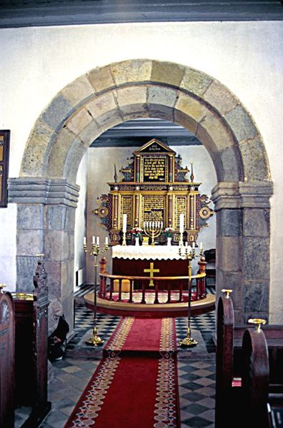 Sønderbæk Kirke, Randers Kommune, korbue